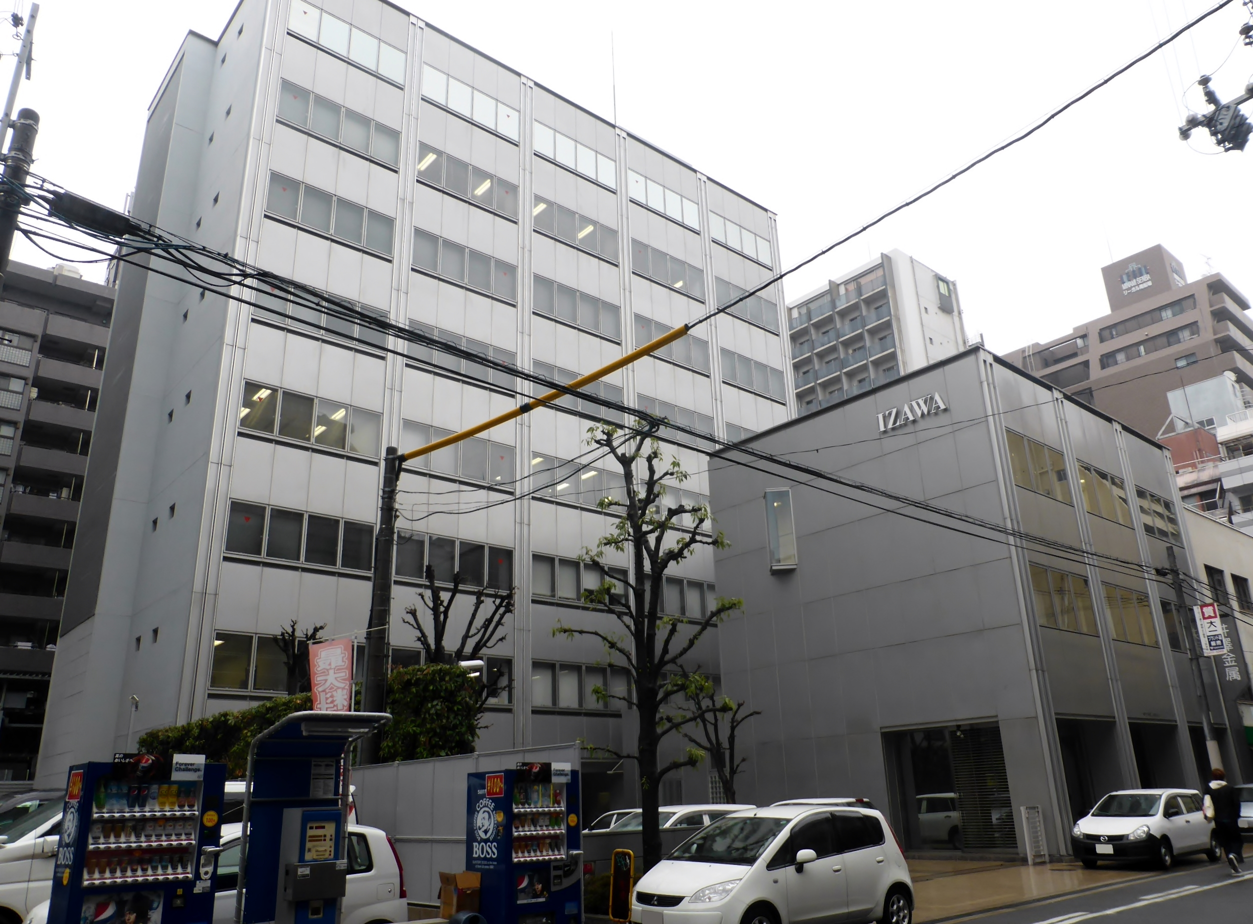 井澤金属株式会社本社を撮影。